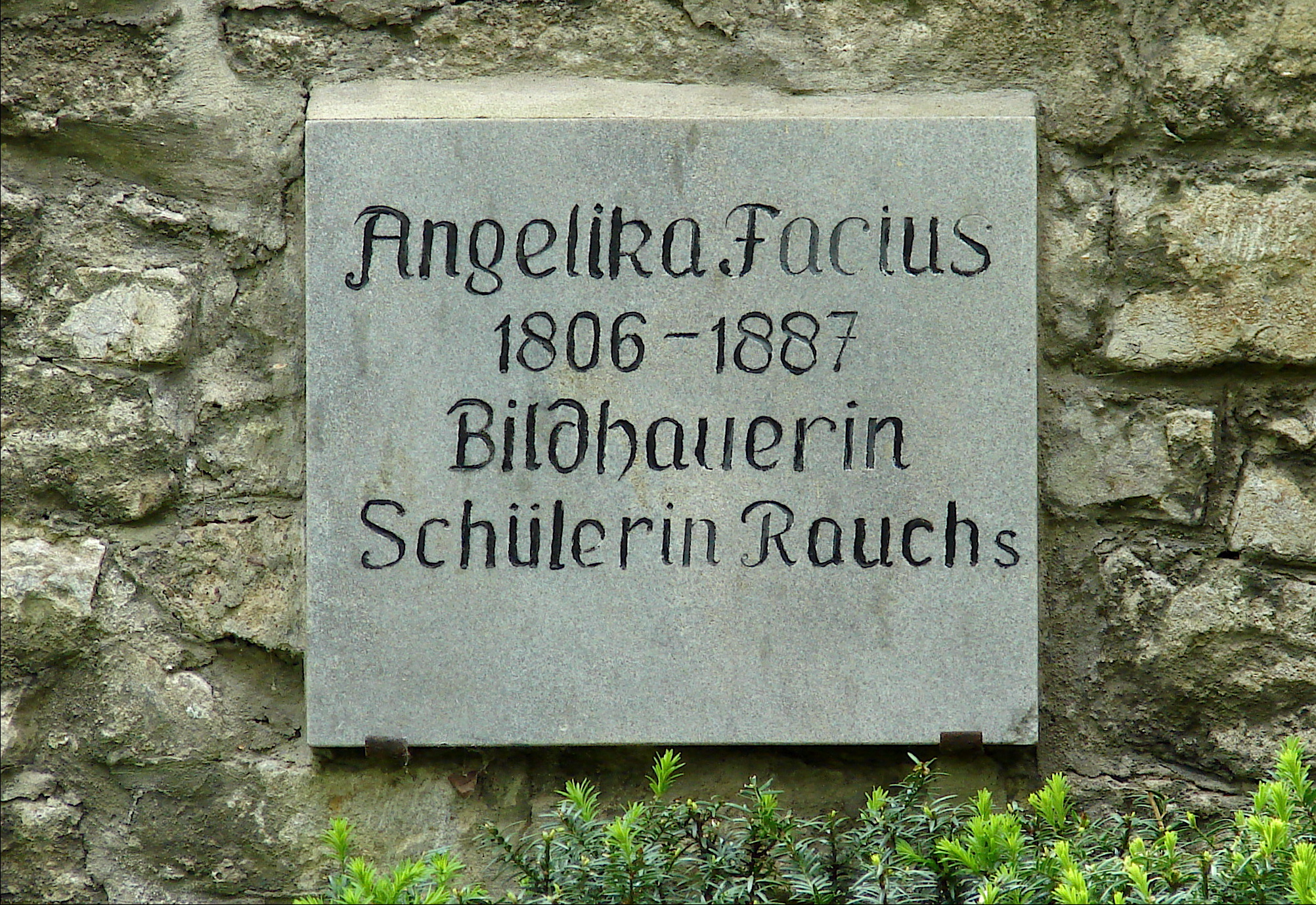 Gravminde over billedhuggerinde Angelica Bellonata Facius (1806-1887, Weimar), Historischer Friedhof Weimar